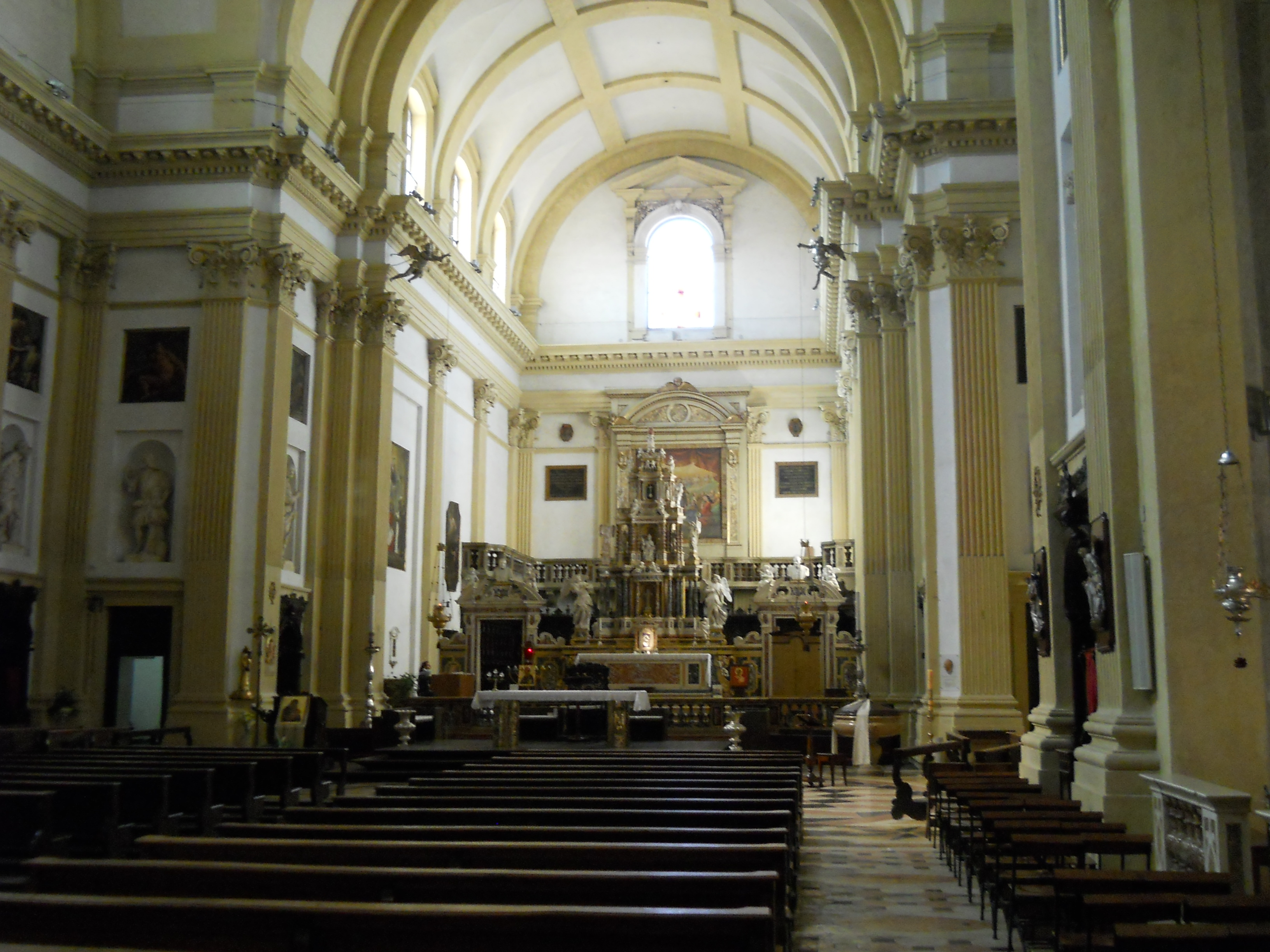 Interno della chiesa di San Nicolò a Verona